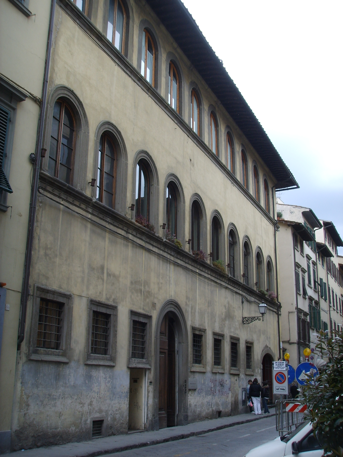 Palazzo gherardi 01 via ghibellina 80r